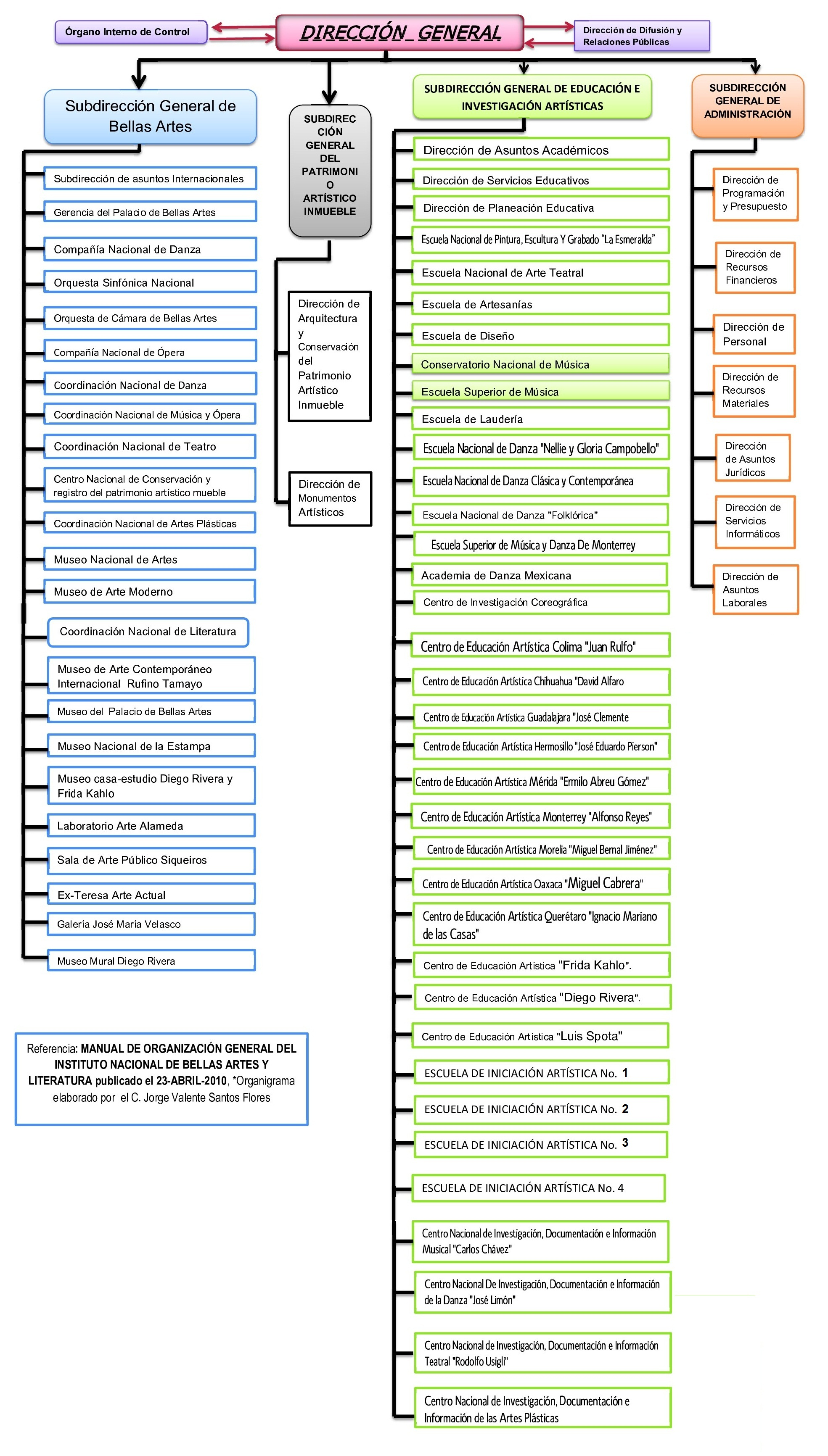 Estructura Orgánica del INBA (México).